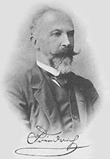 Frederik I van Anhalt.